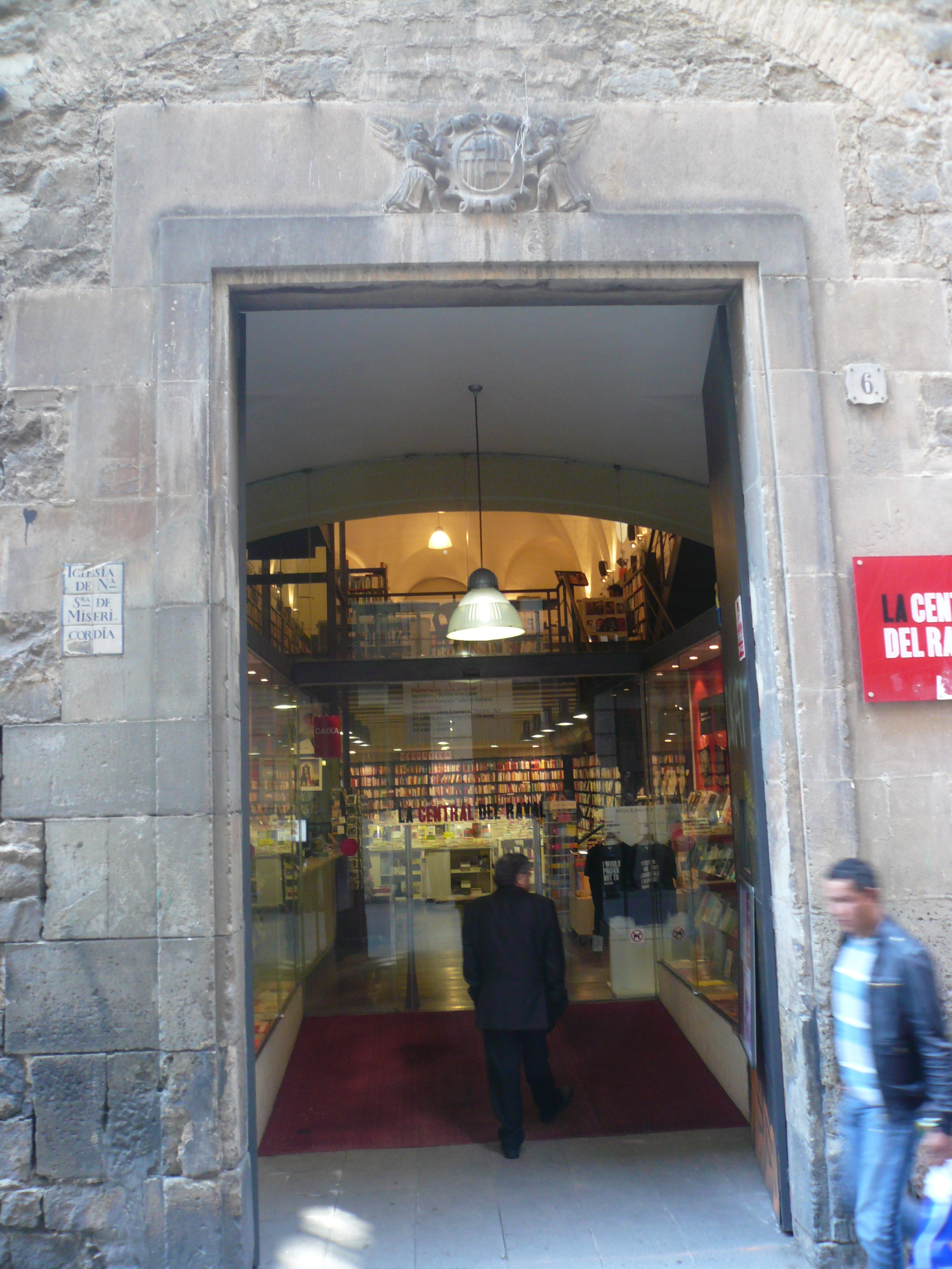 Conjunt de la Casa de la Misericòrdia. C/ Elisabets, 6-14 - c/ Ramalleres - pl. Vicenç Martorell (Barcelona). Object location41° 23′ 00.92″ N, 2° 10′ 06.76″ E